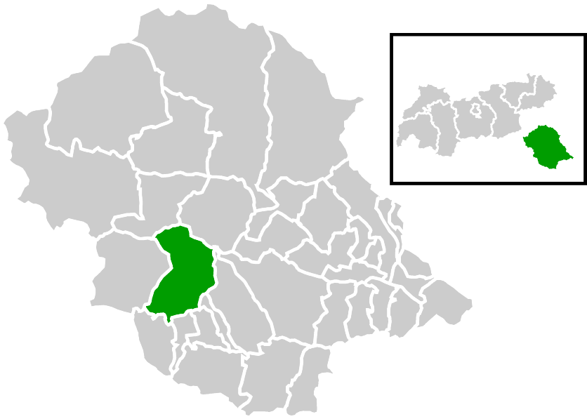 Lage der Gemeinde innerhalb des Bezirks Lienz